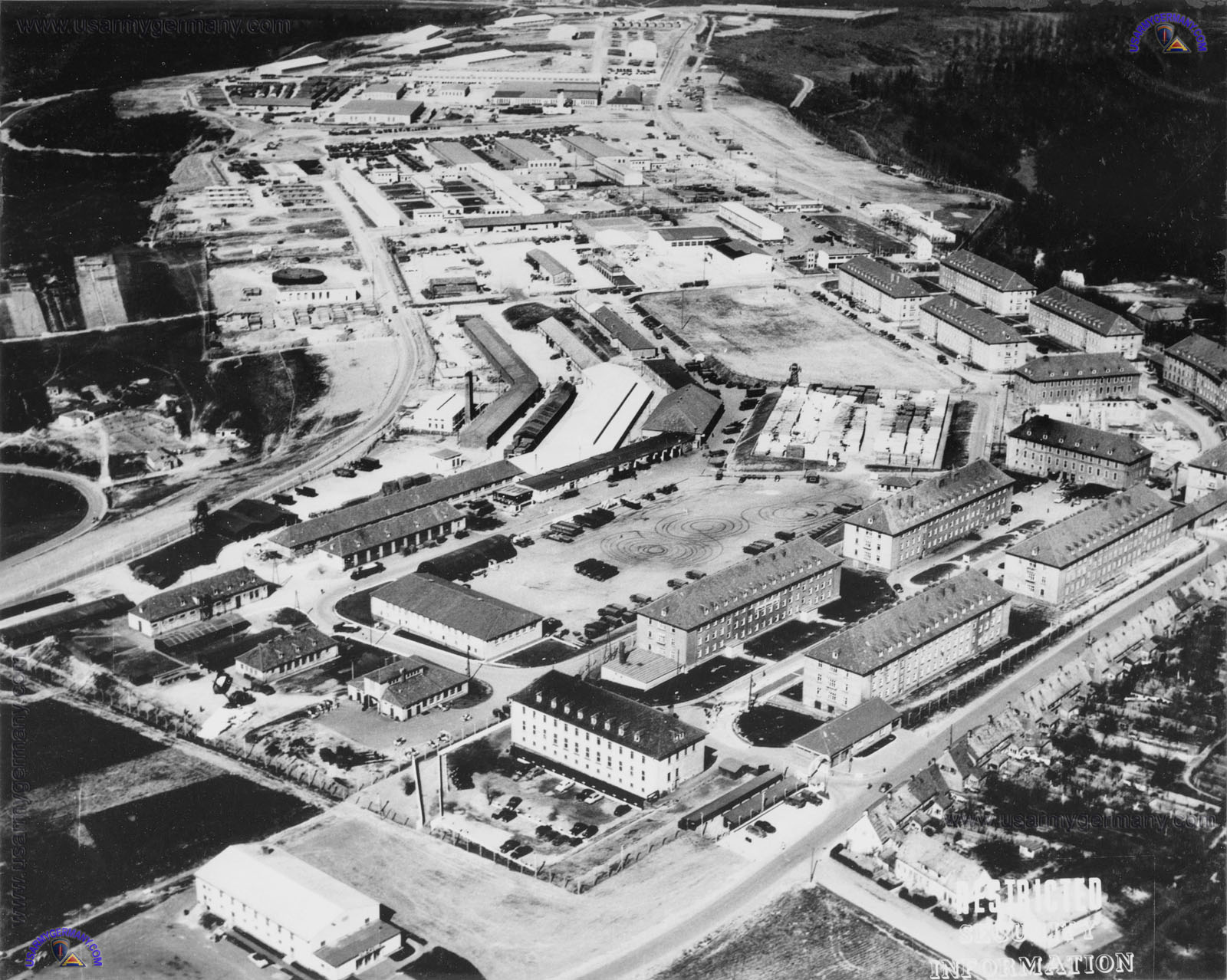 Courtesy of Webmaster, US Army Europe